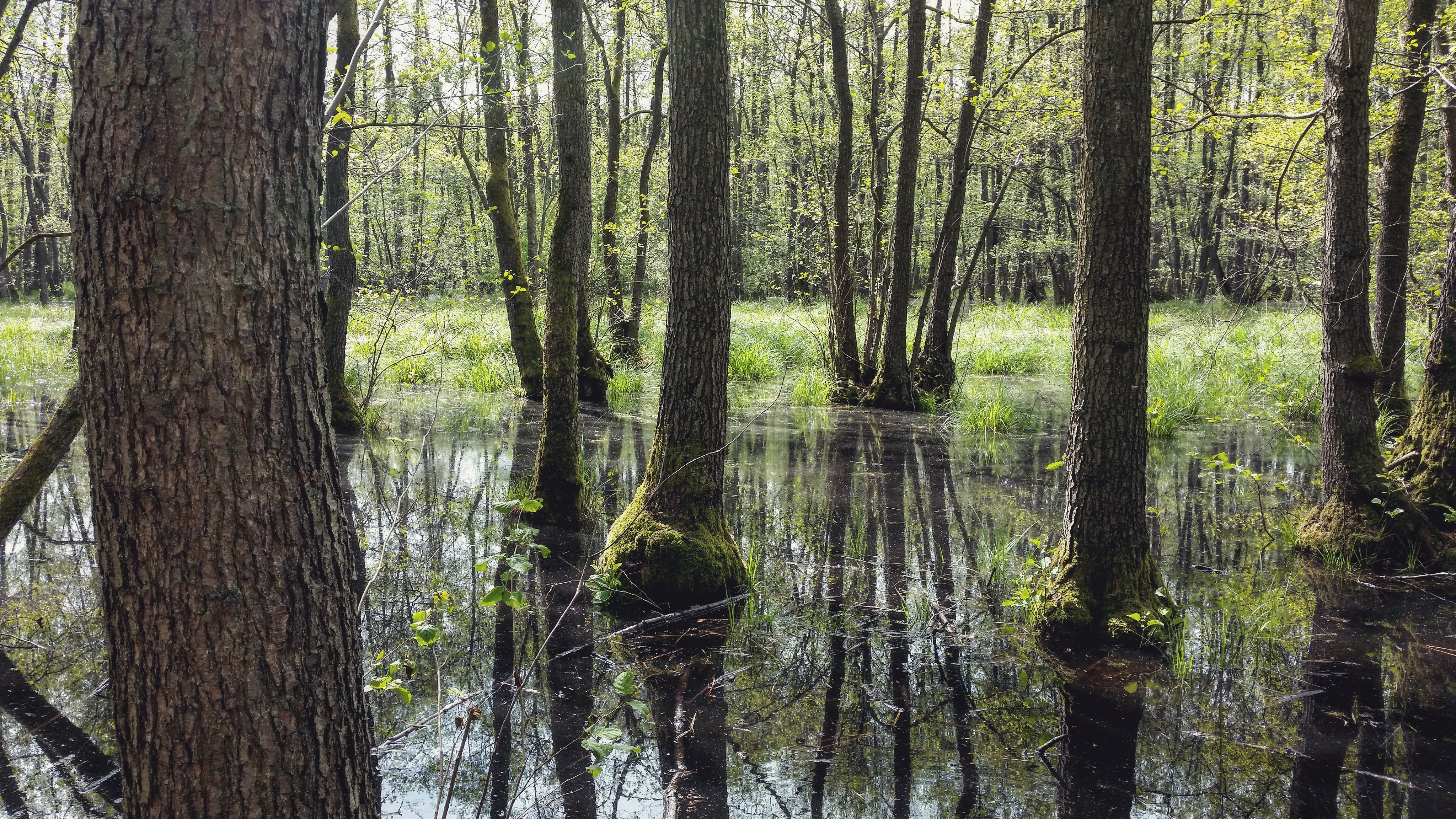 Das Bild zeigt die typische Szenerie der Roten Lache bei Hanau/Wolfgang.